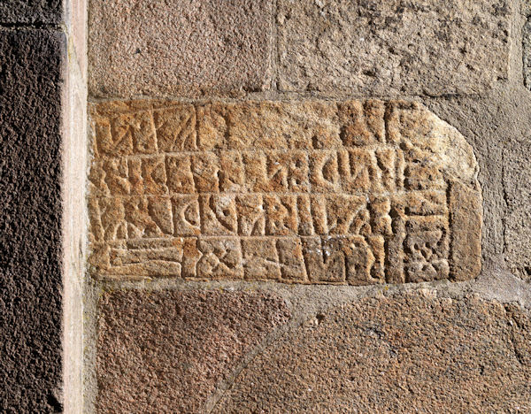 Foto af Roberto Fortuna